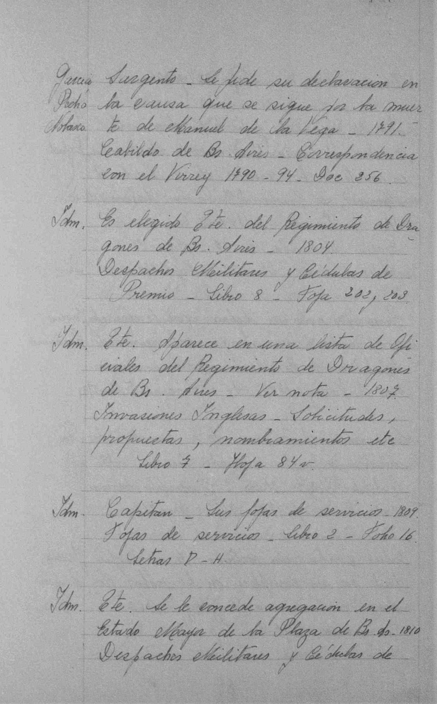 transcripción con diversas notas acerca de las actuaciones militares de Pedro Nolasco García.